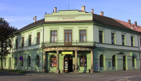 Městský dům tzv. Stará pošta (Kolín), Rorejcova 656, Kolín